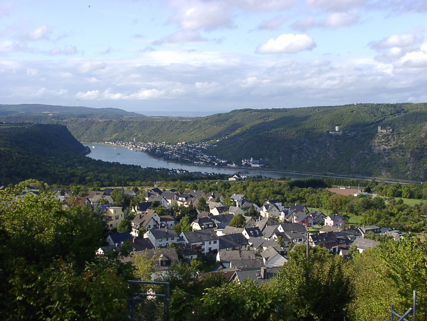 Weiler ein Stadtteil von Boppard am Rhein